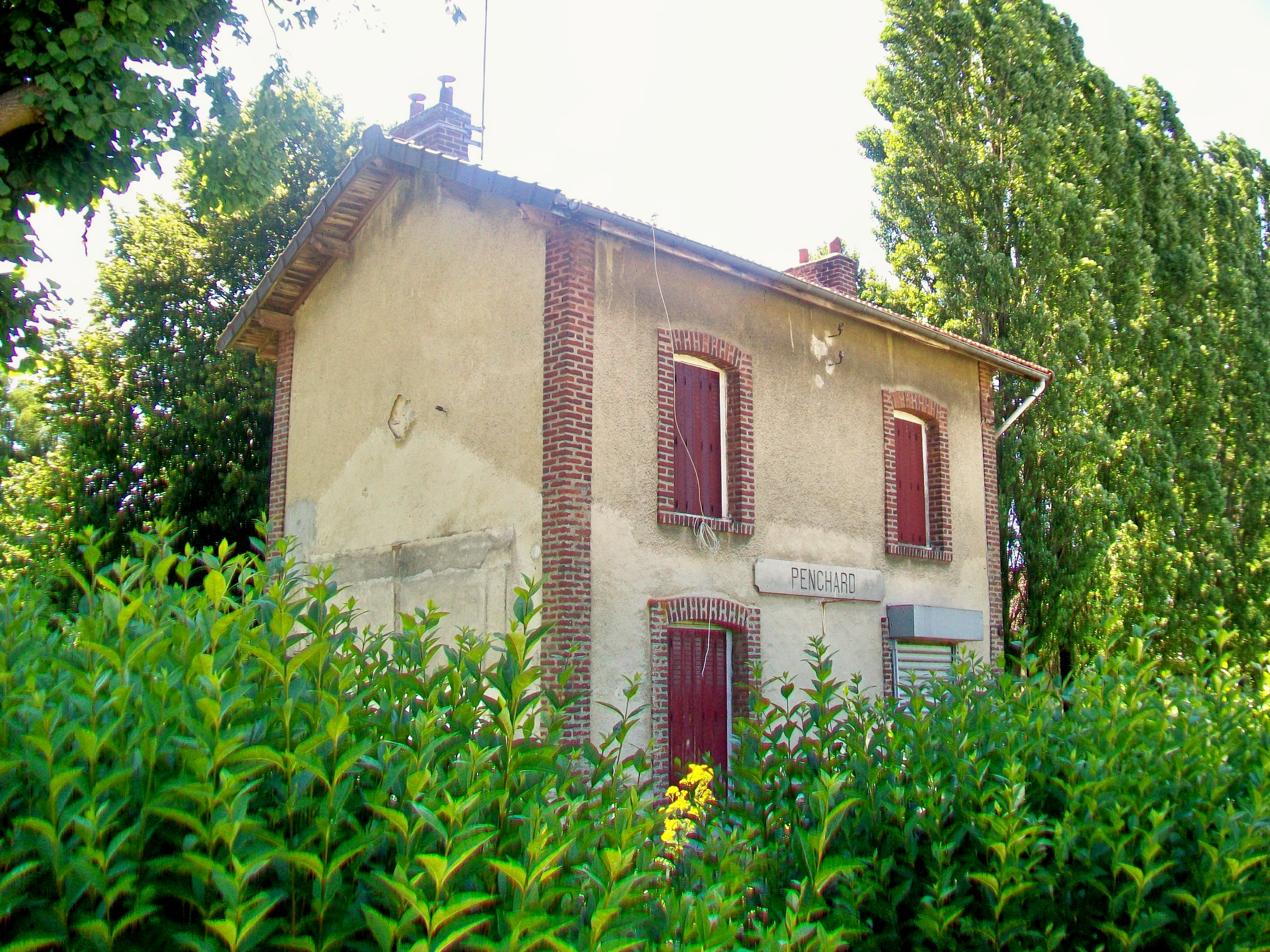 L'ancienne gare de Penchard, côté voies. Le bâtiment est aujourd'hui inocccupé, les sanitaires devant le mur pignon ont été démolies.